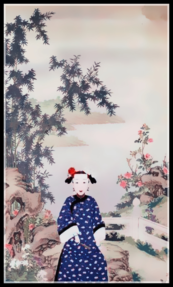 清 佚名 《孝慎成皇后行乐图》, Empress Xiaoshencheng